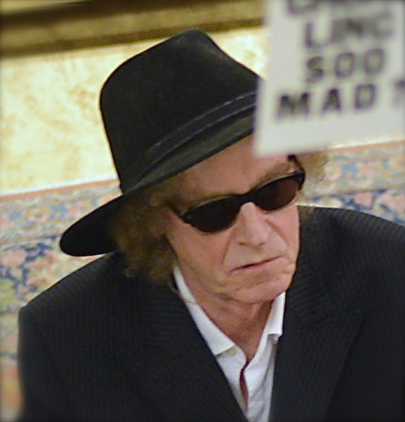 Bruno K Öijer signerar sin nya diktsamling "Och natten viskade Annabel Lee" på Rönnells antikvariat i Stockholm.